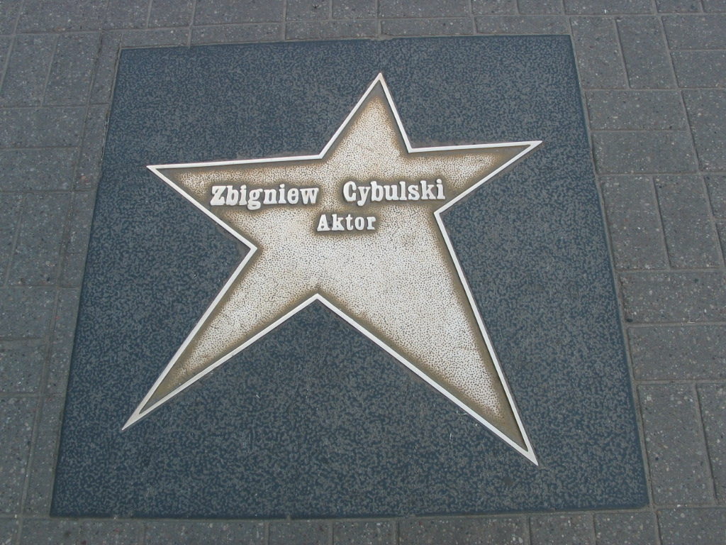 Łódź Walk of Fame - Zbigniew Cybulski